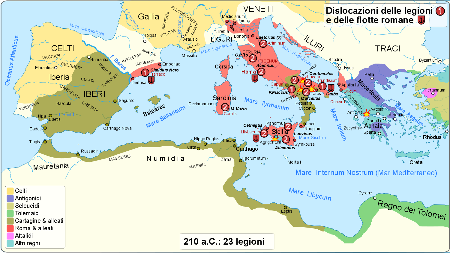 Dislocazione e dimensione delle armate romane nel 210 a.C. durante la seconda guerra punica